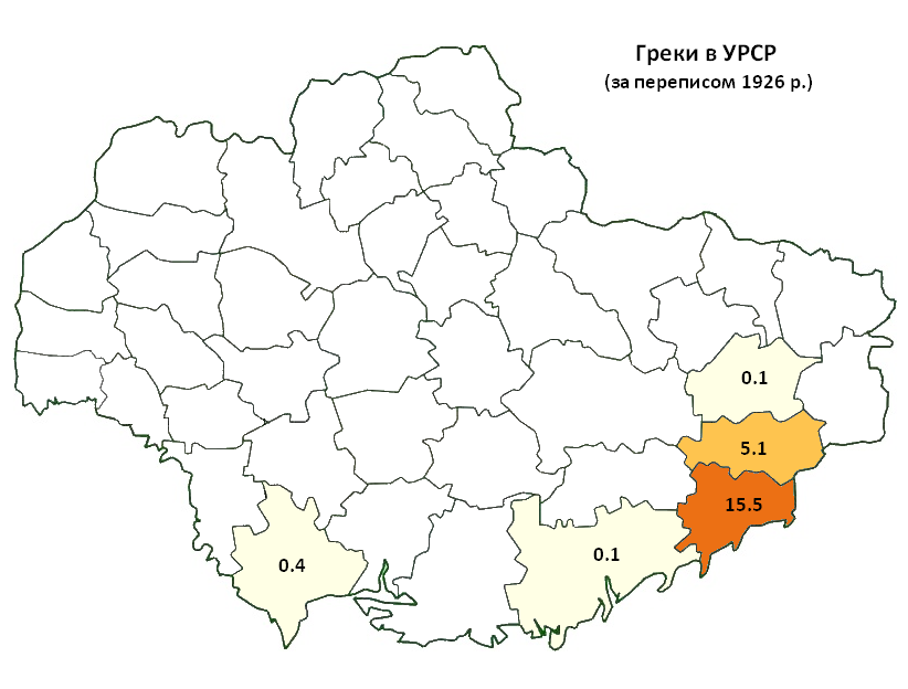 Розселення греків в УРСР за даними перепису 1926 р. / Greeks in Ukrainian SSR according to 1926 census